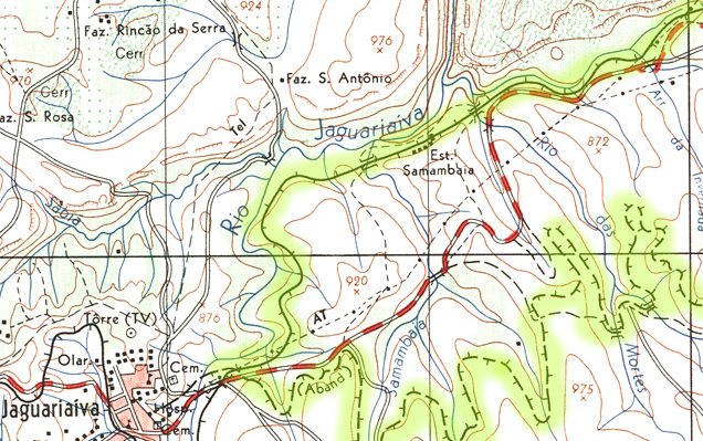 EFSPRG nas imediações de Jaguariaíva, com destaque em amarelo-limão para a linha original mais abaixo, e a variante mais acima. A linha original era tão tortuosa que era conhecida como "pior trecho ferroviário do Brasil".